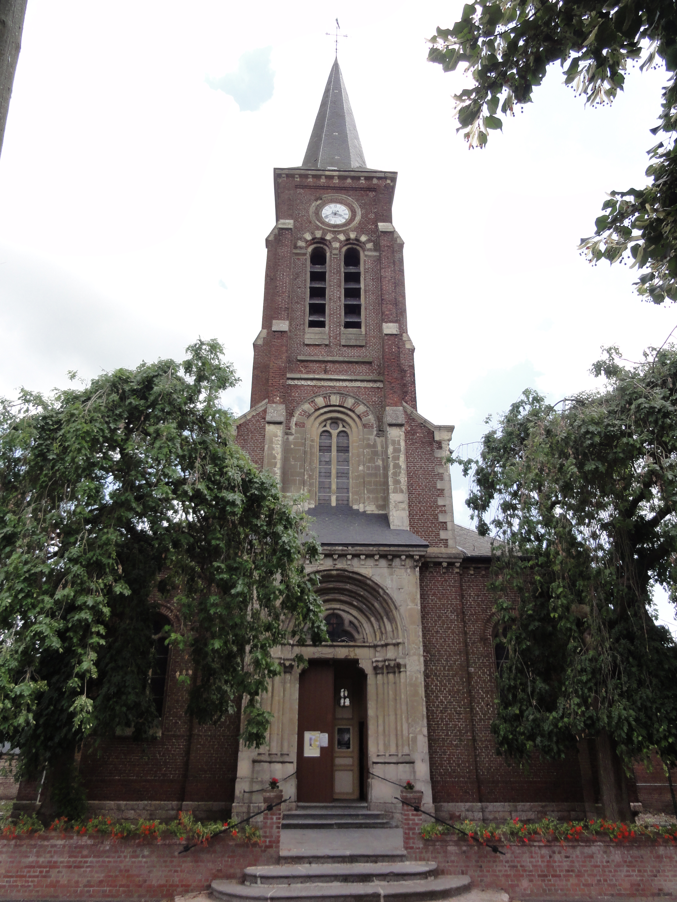 Romeries (Nord, Fr) église, façade